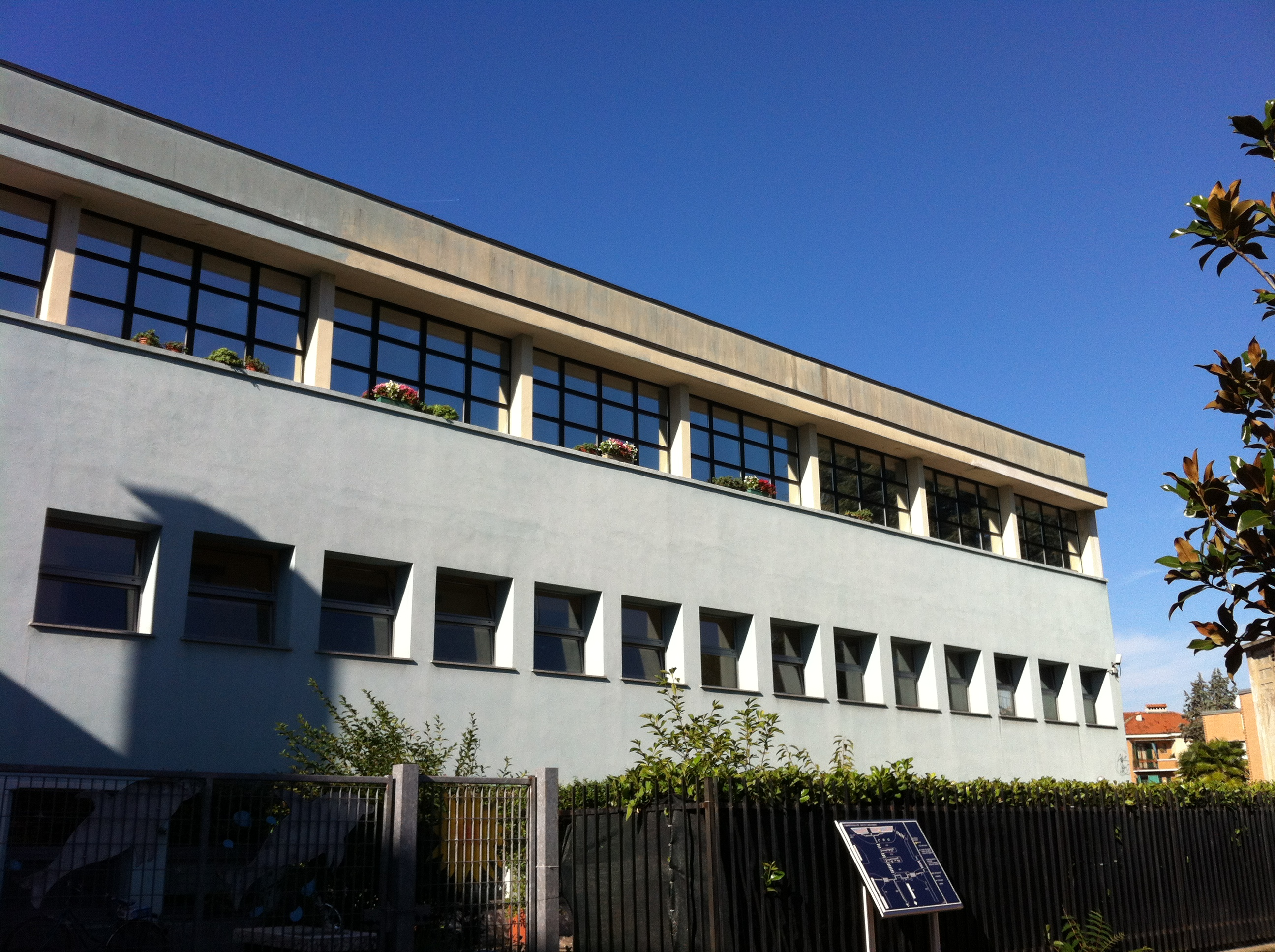 Ex Casa del Fascio This is a photo of a monument which is part of cultural heritage of Italy.